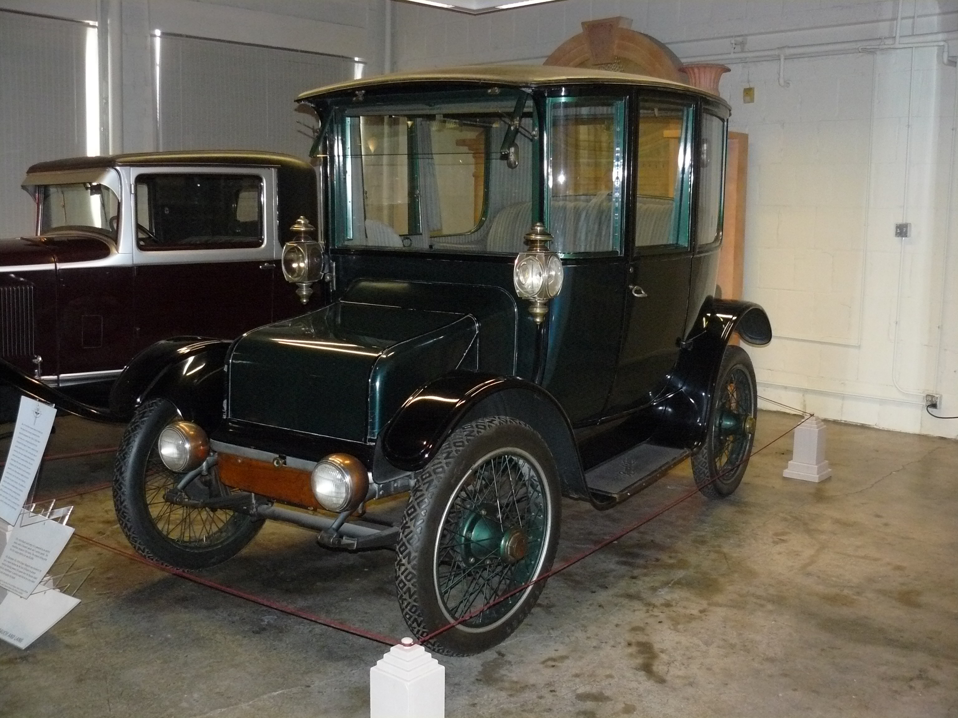 Musée d'Auburn.